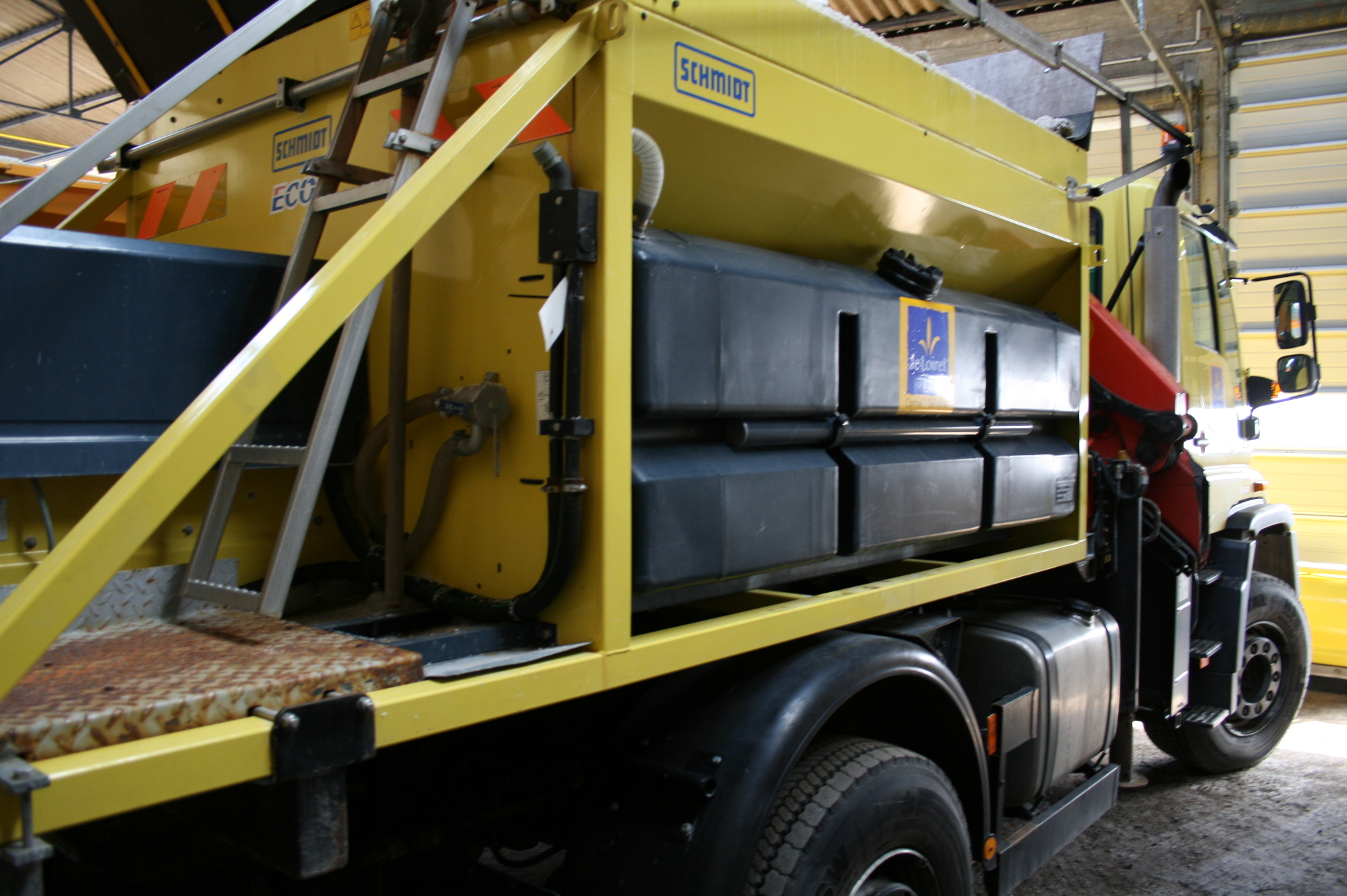 Cuve à saumure d'une épandeuse (outil de répandage du sel pour le déneigement des routes)